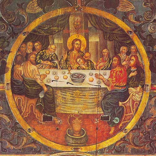 Апошняя Вячэра. Сярэдзіна XVIІI ст. Давыд-Гарадок